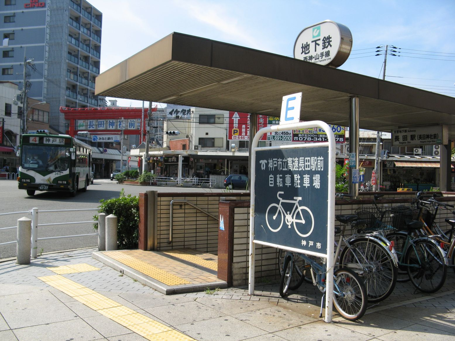 神戸市営地下鉄長田駅 南東出口